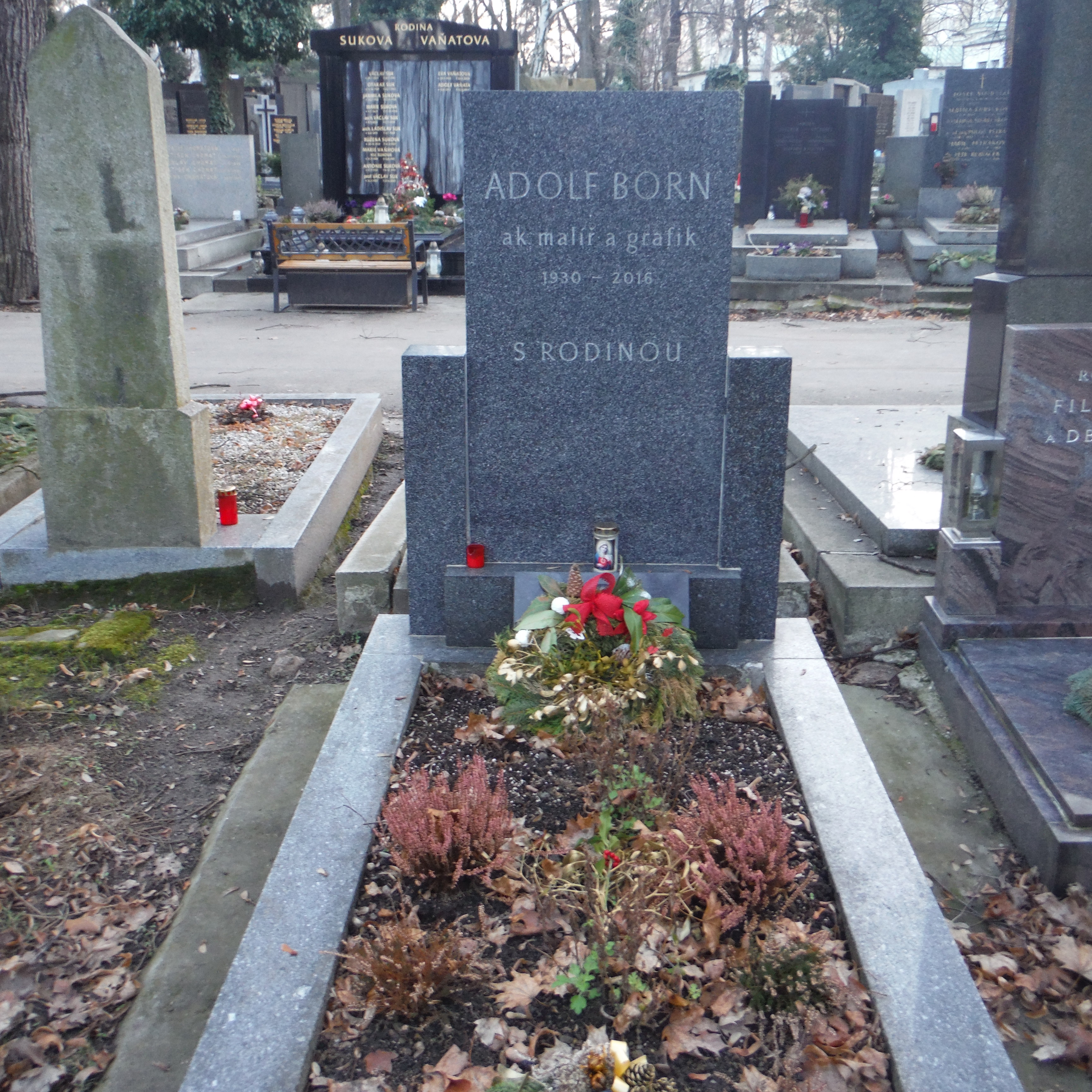 hrob na Olšanech